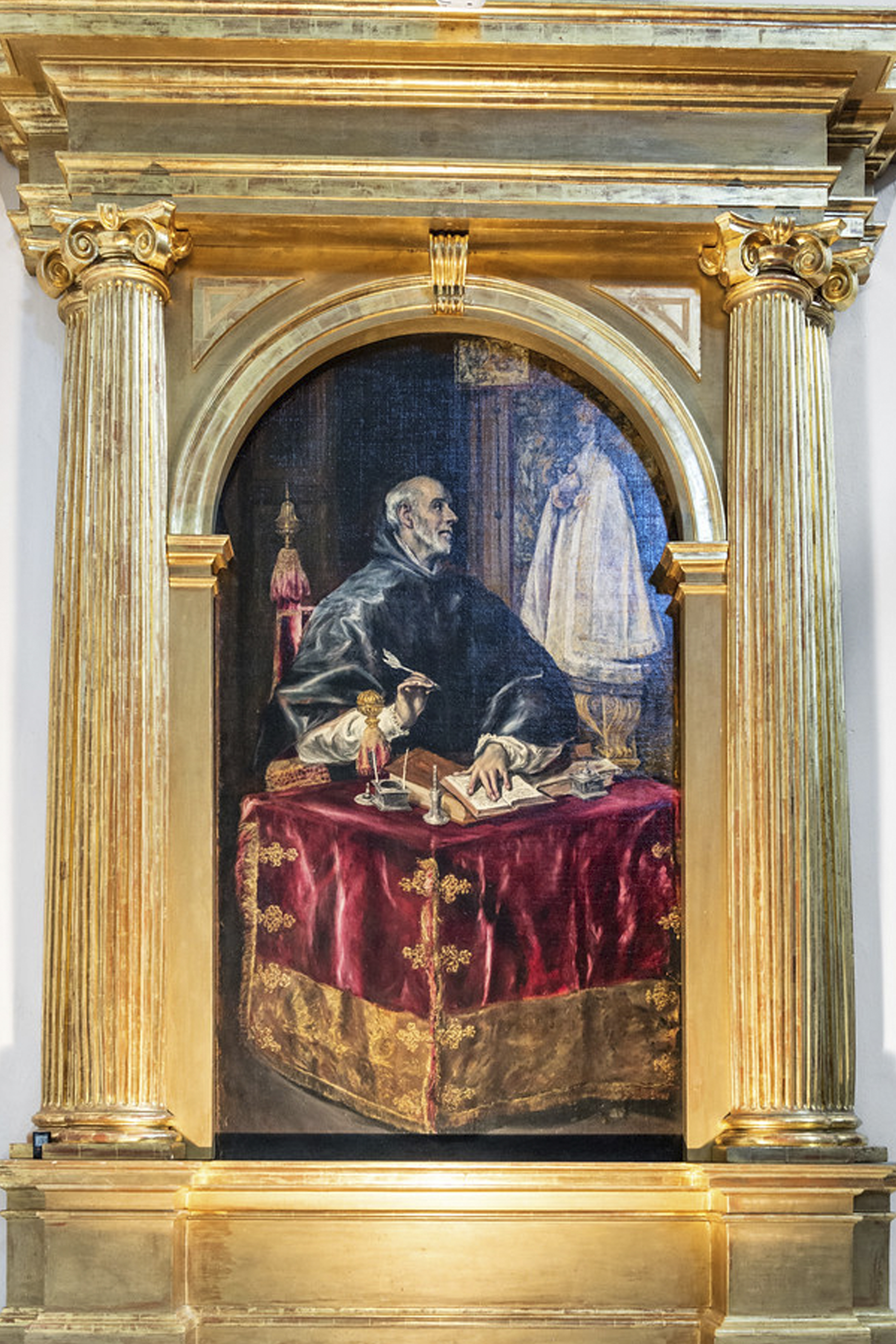 Aquests quatre Retaules laterals, amb el Retaule Central i quatre magnifiques pintures i unes estàtues, formaven el conjunt realitzat per El Greco per aquest Santuari.